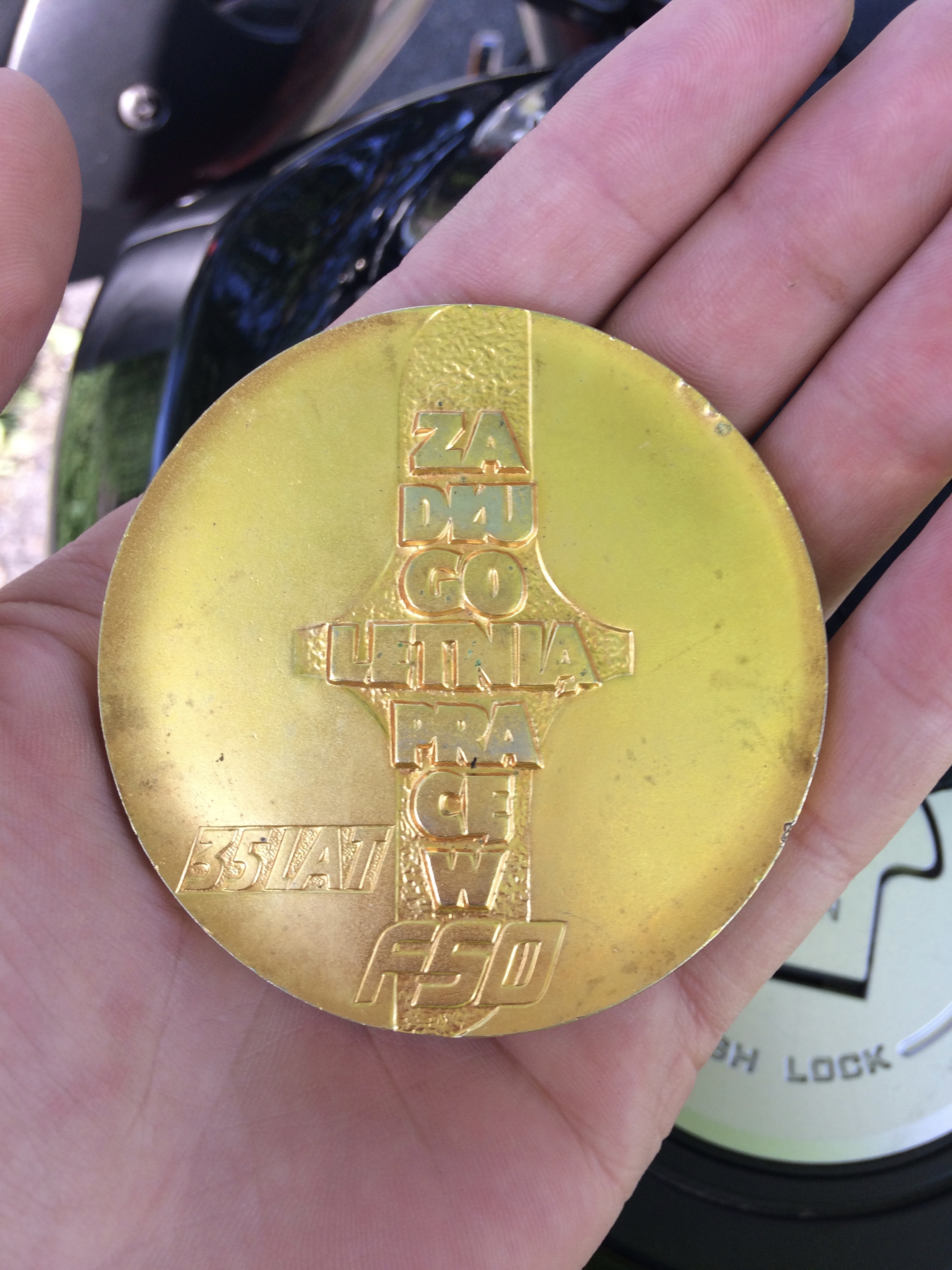 nagroda za długoletnią pracę w FSO